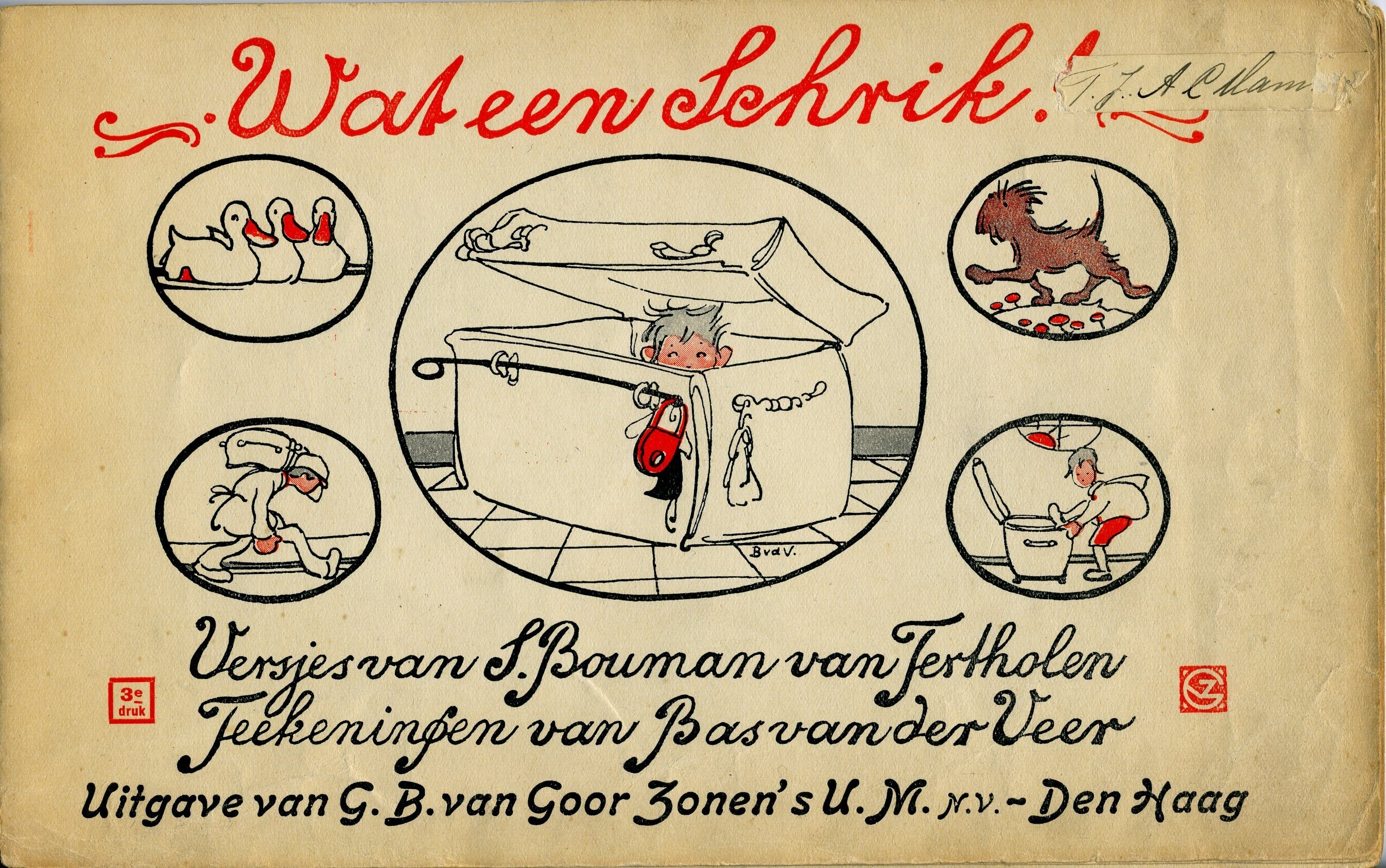 Wat een Schrik! (1931) versjes van S. Bouman-van Tertholen, tekeningen van Bas van der Veer, 3e druk. Eerste uitgave in 1922.